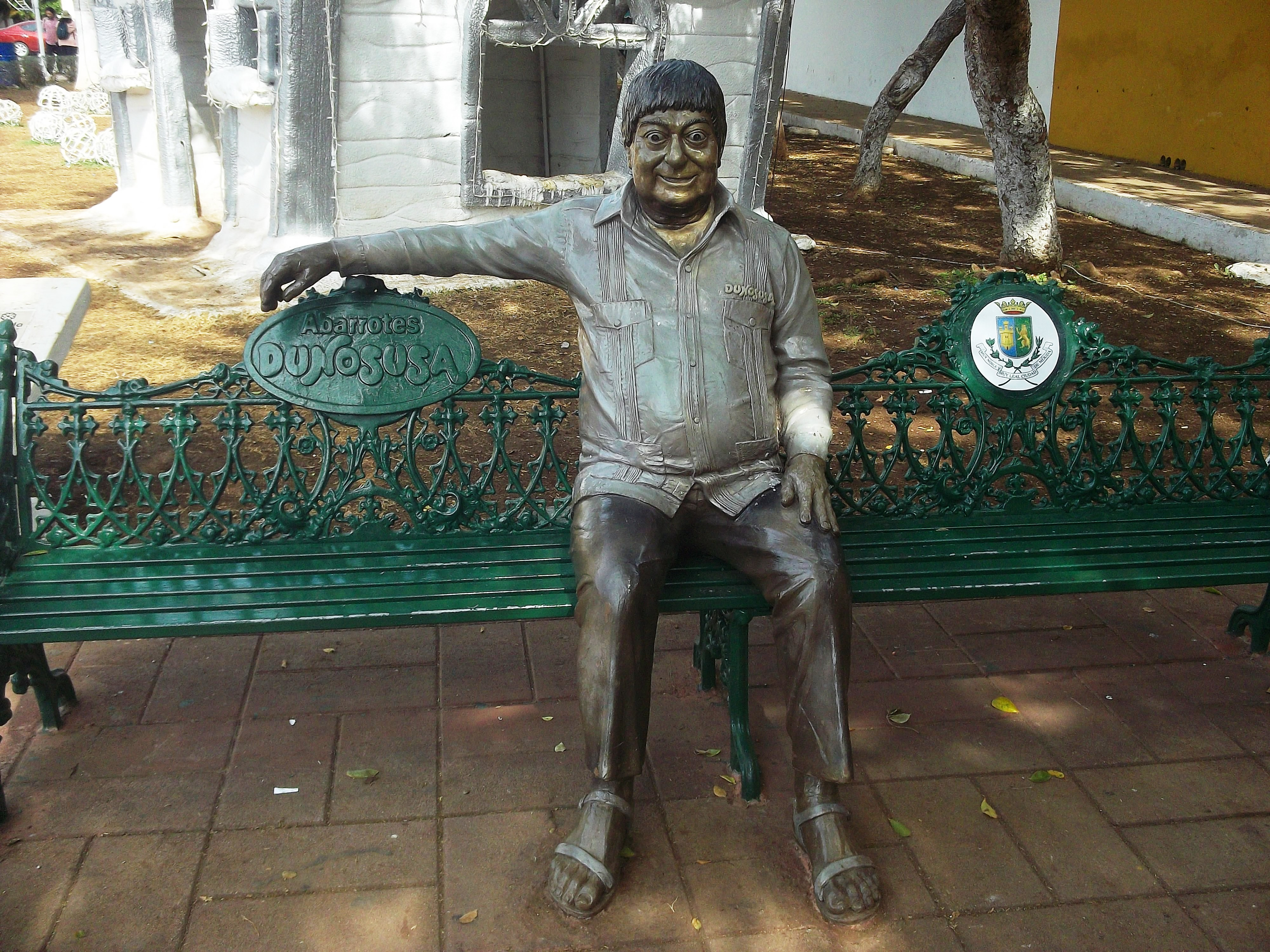 Estatua de Cholo en Mérida, Yucatán.